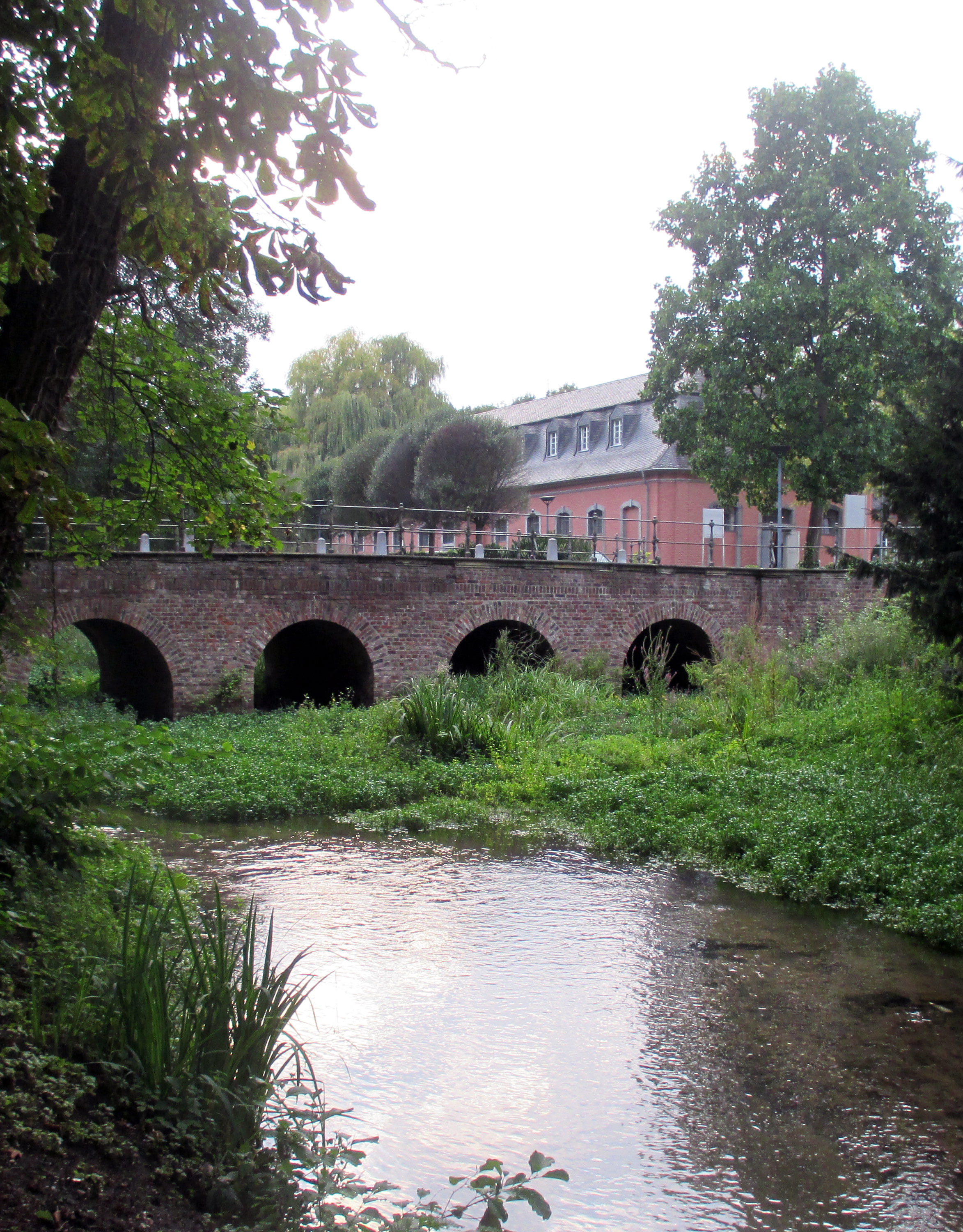 Schloss Wickrath, Karotte mit Karottebrücke und Nassauer Stall im Hintergrund